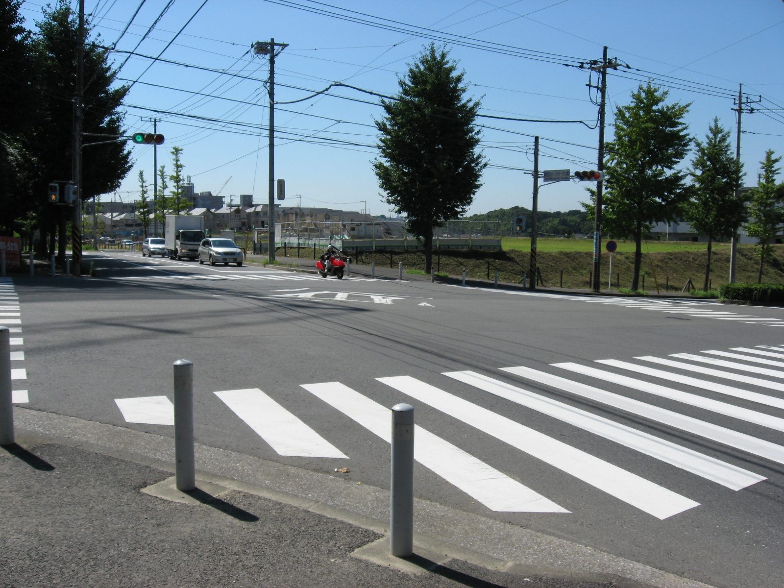 嶮山スポーツガーデン前交差点